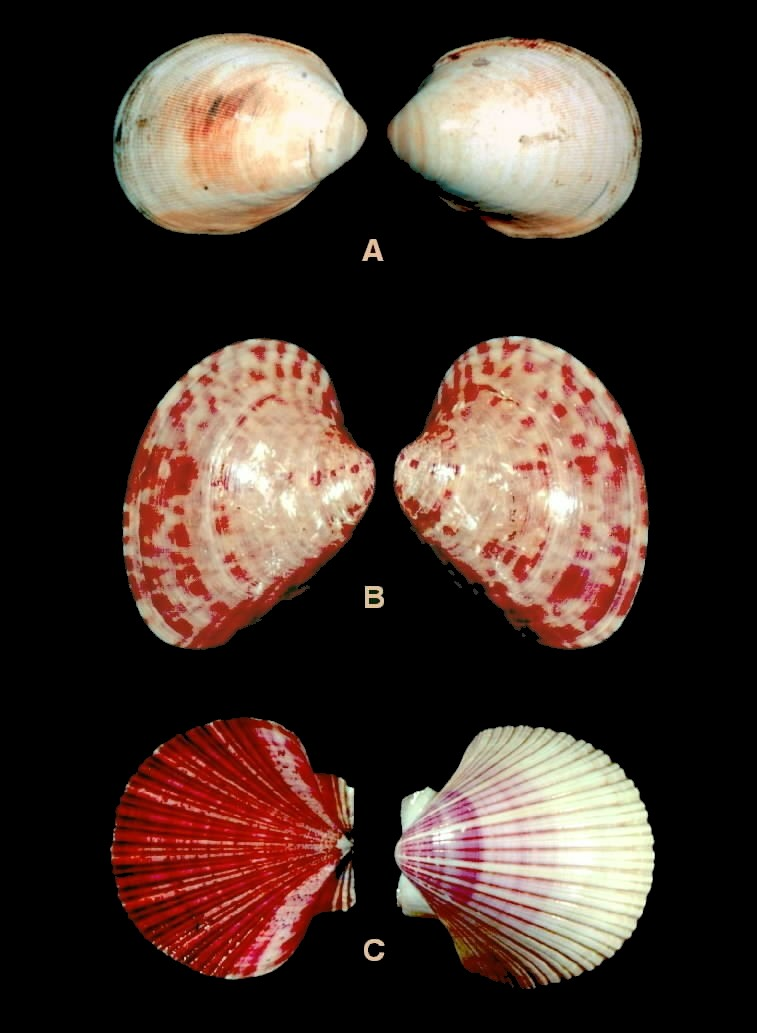 Fotos de Moluscos del estado Falcón - Venezuela A. Laevicardium laevigatum B. Macrocallista maculata C. Pecten ziczac